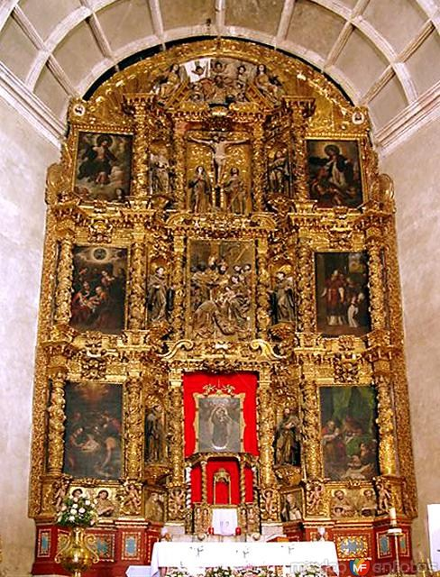 This is a photo of a church in Meztitlán, Hidalgo